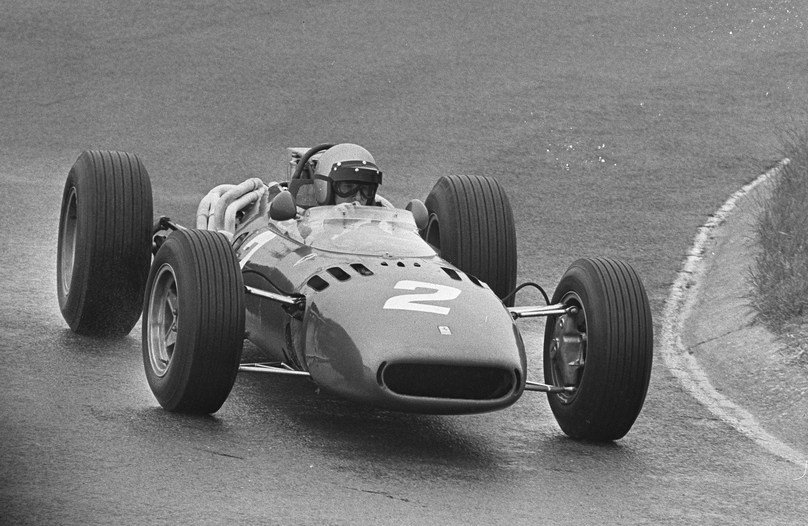 Collectie / Archief : Fotocollectie Anefo Reportage / Serie : [ onbekend ] Beschrijving : Grand Prix Zandvoort , training, Lorenzo Bandini met Ferrari Datum : 22 juli 1966 Persoonsnaam : FERRARI Fotograaf : Koch, Eric / Anefo Auteursrechthebbende : Nationaal Archief Materiaalsoort : Negatief (zwart/wit) Nummer archiefinventaris : bekijk toegang 2.24.01.05 Bestanddeelnummer : 919-3822